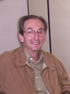 José Pedro Barrán en el Departamento de Historia del Uruguay de la Facultad de Humanidades y Ciencias de la Educación de Montevideo